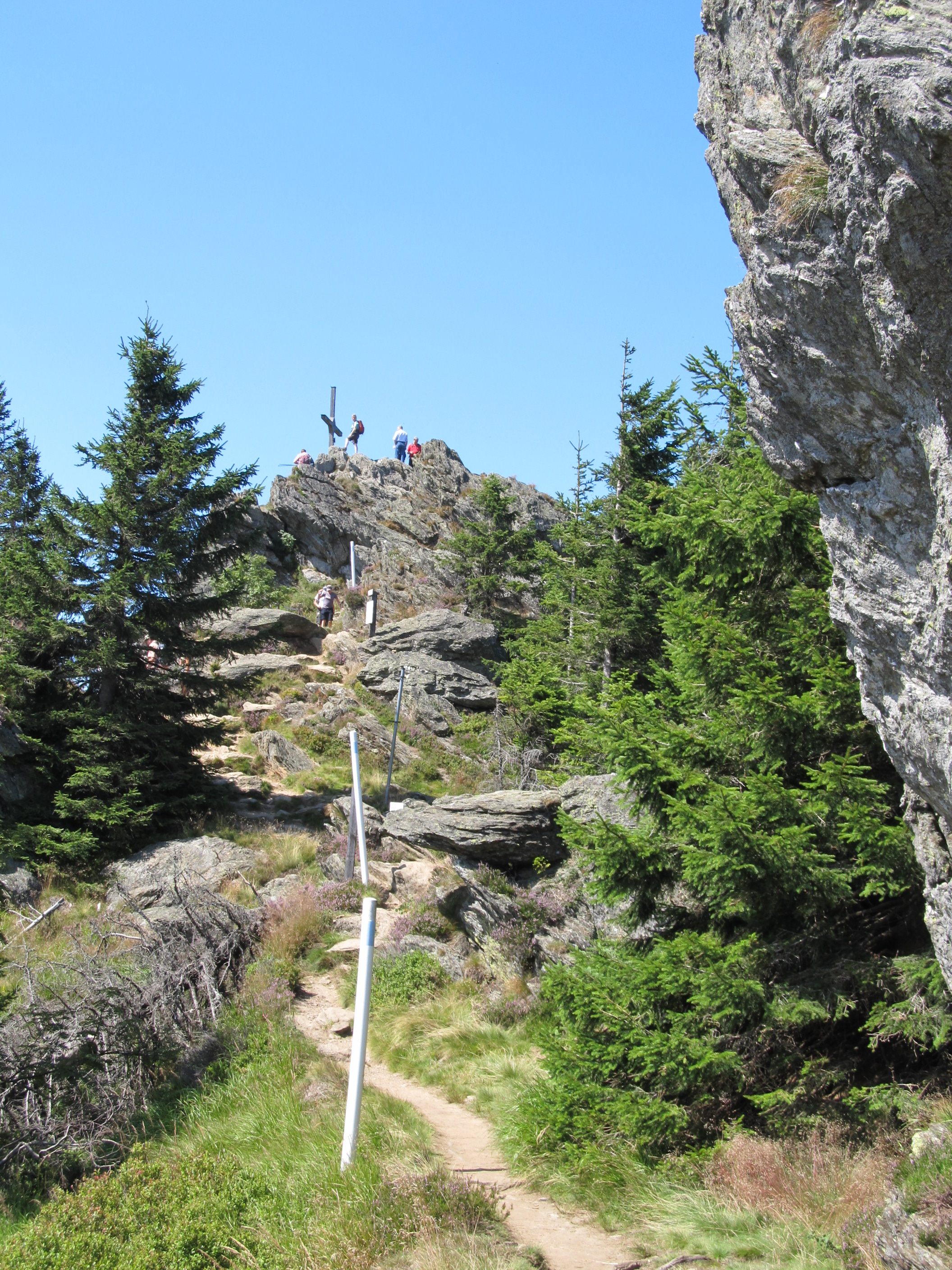 Velký Ostrý - vrchol